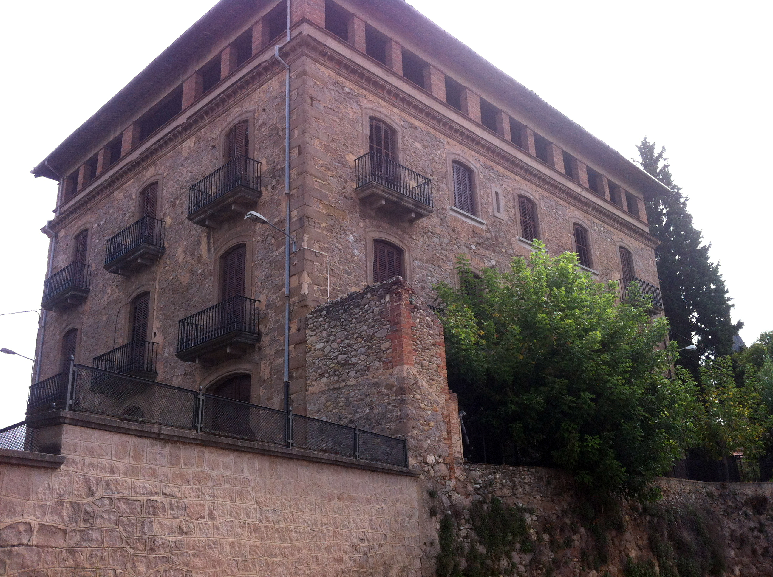 Torre dels amos de la colònia de Cal Metre